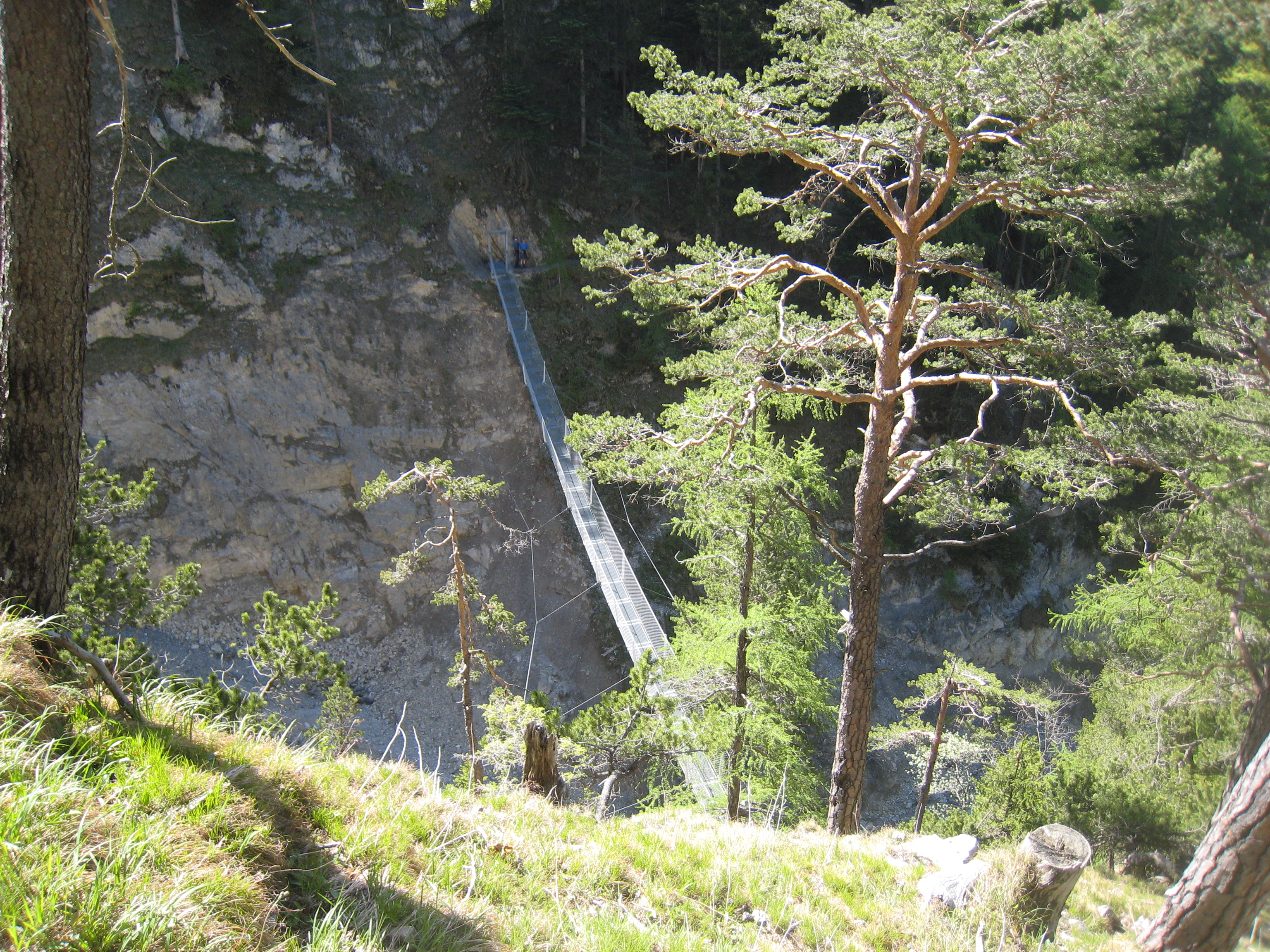 Hängebrücke über die Sulzleklamm